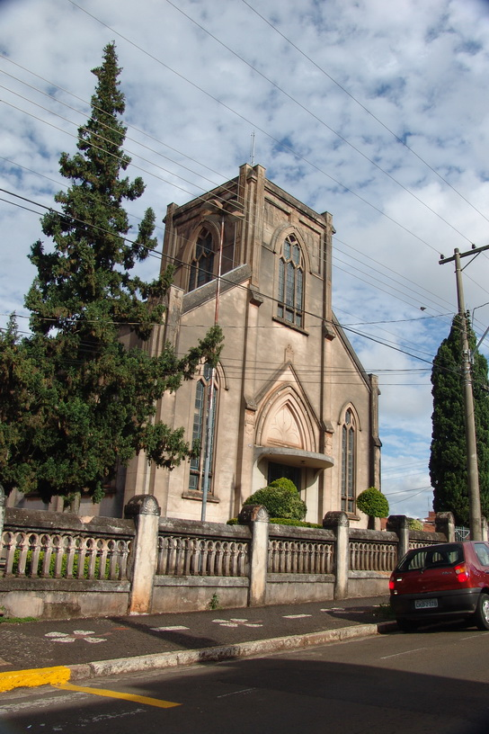 Imagem do município de Botucatu, estado de São Paulo, Brasil.